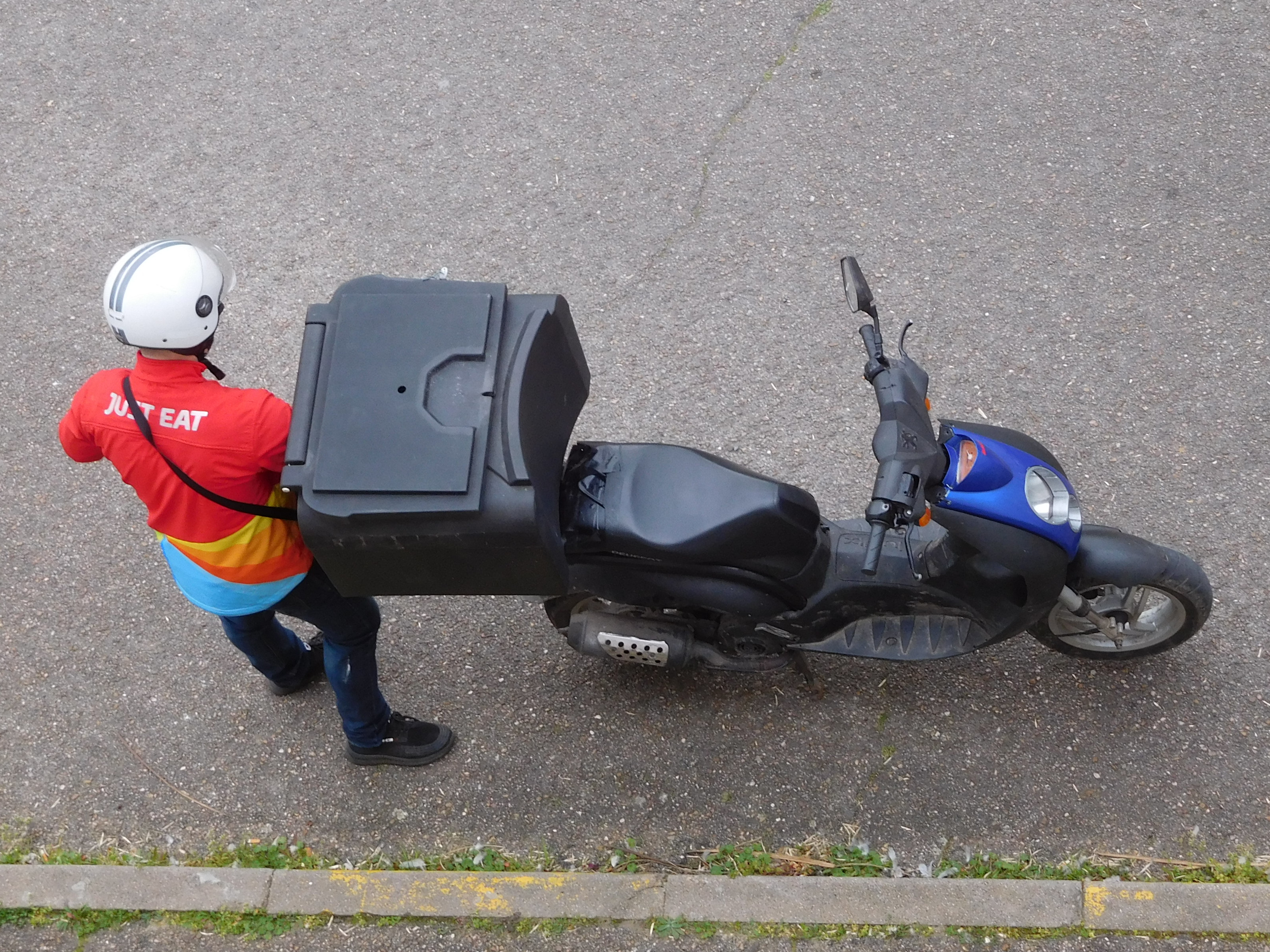 Livreur de l'entreprise Just Eat au pied d'un immeuble, restauration livrée à domicile à scooter ; Cosne-Cours-sur-Loire, Nièvre, France.